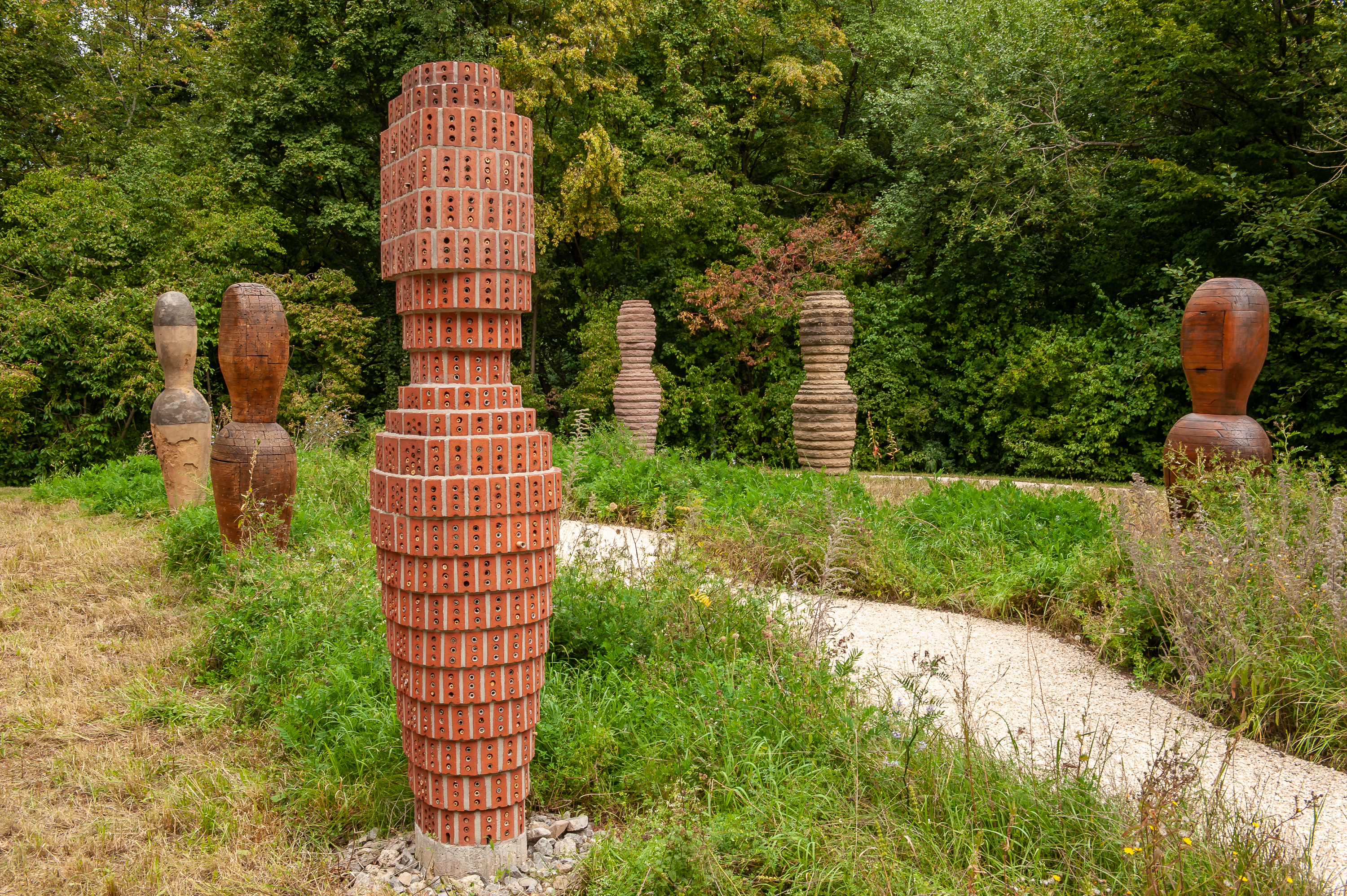 Bienengarten von Jeanette Zippel auf dem Wartberggelände, Stuttgart. Zustand nach der Renovierung 2019.